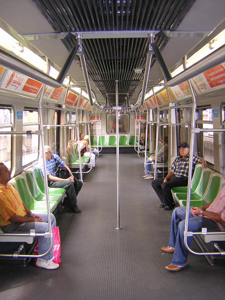 interior de un vagón del Metro de Medellín, Colombia.